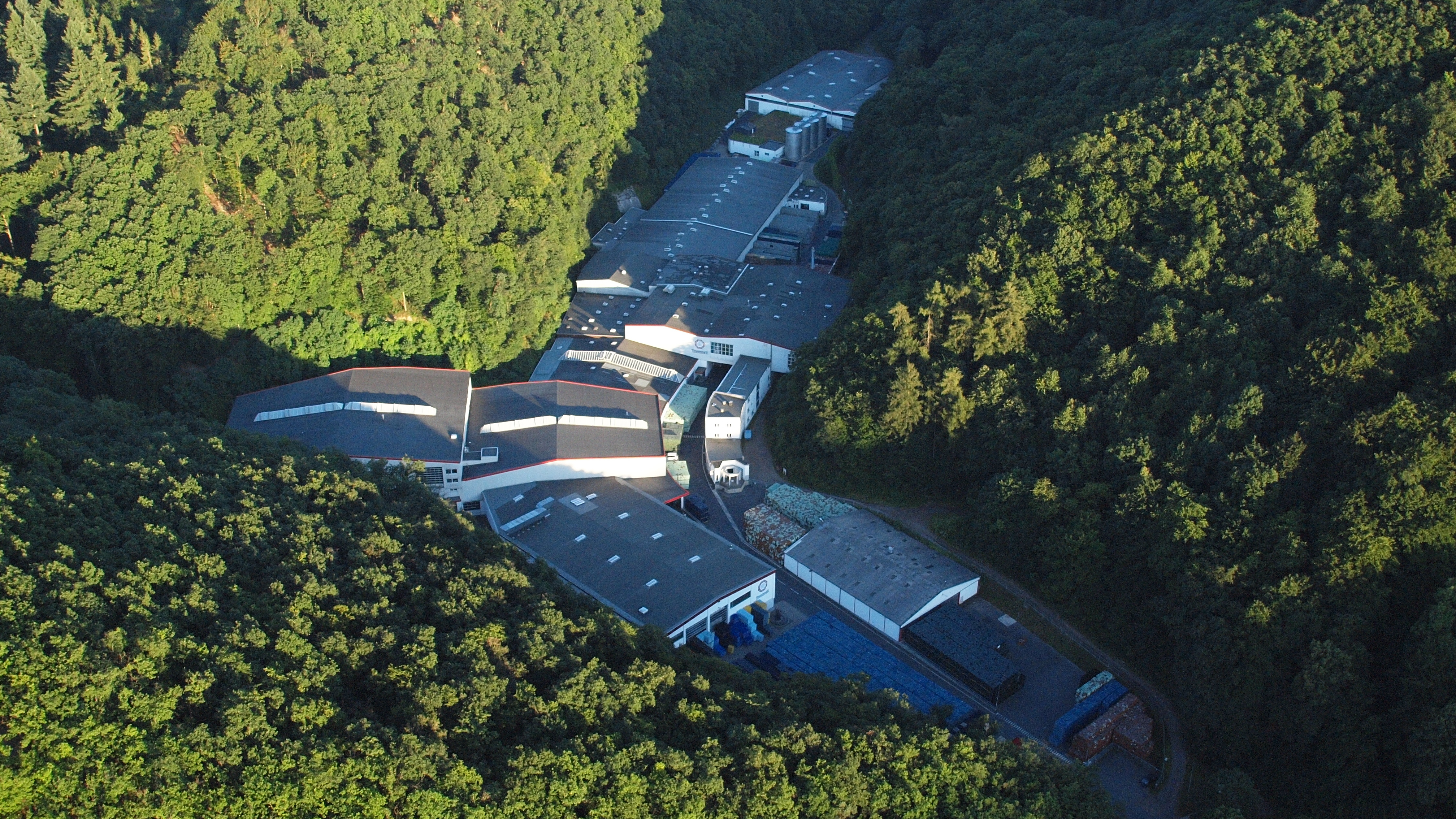 Tönissteiner Privatbrunnen im Brohltal: Luftaufnahme